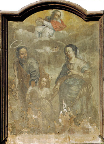 Святая Сям’я. Другая палова XVIІ ст. З-пад Ваўкавыска. Музей старажытнабеларускай культуры ІМЭФ НАН Беларусі